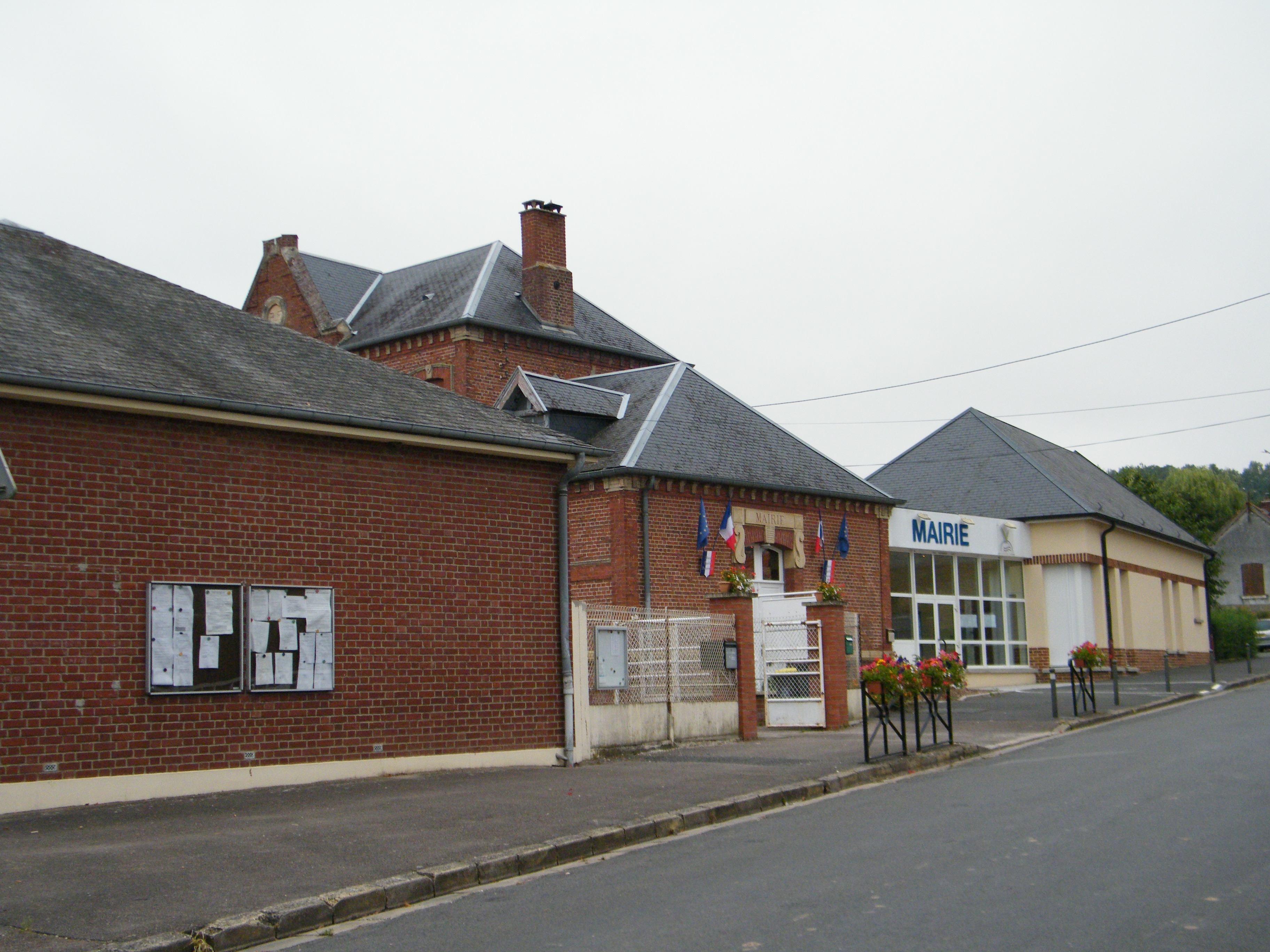 Mairie.